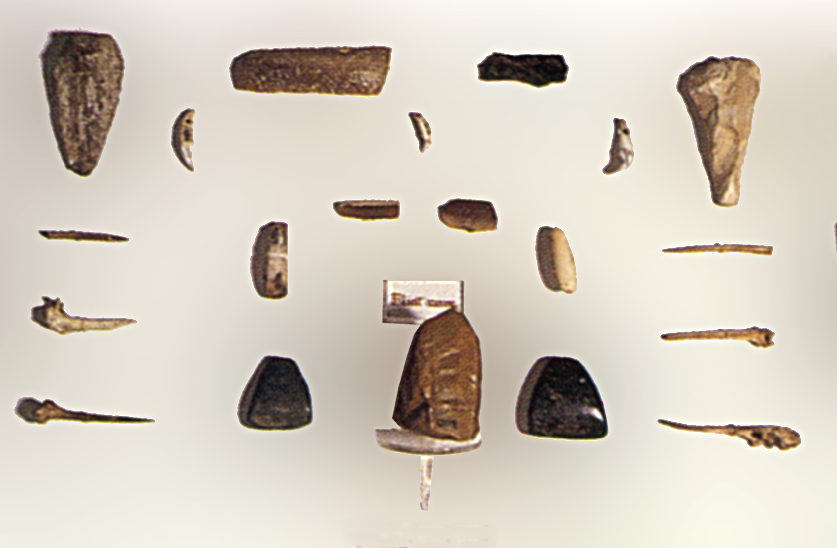 os et outils lithiques phase Ghar Dalam